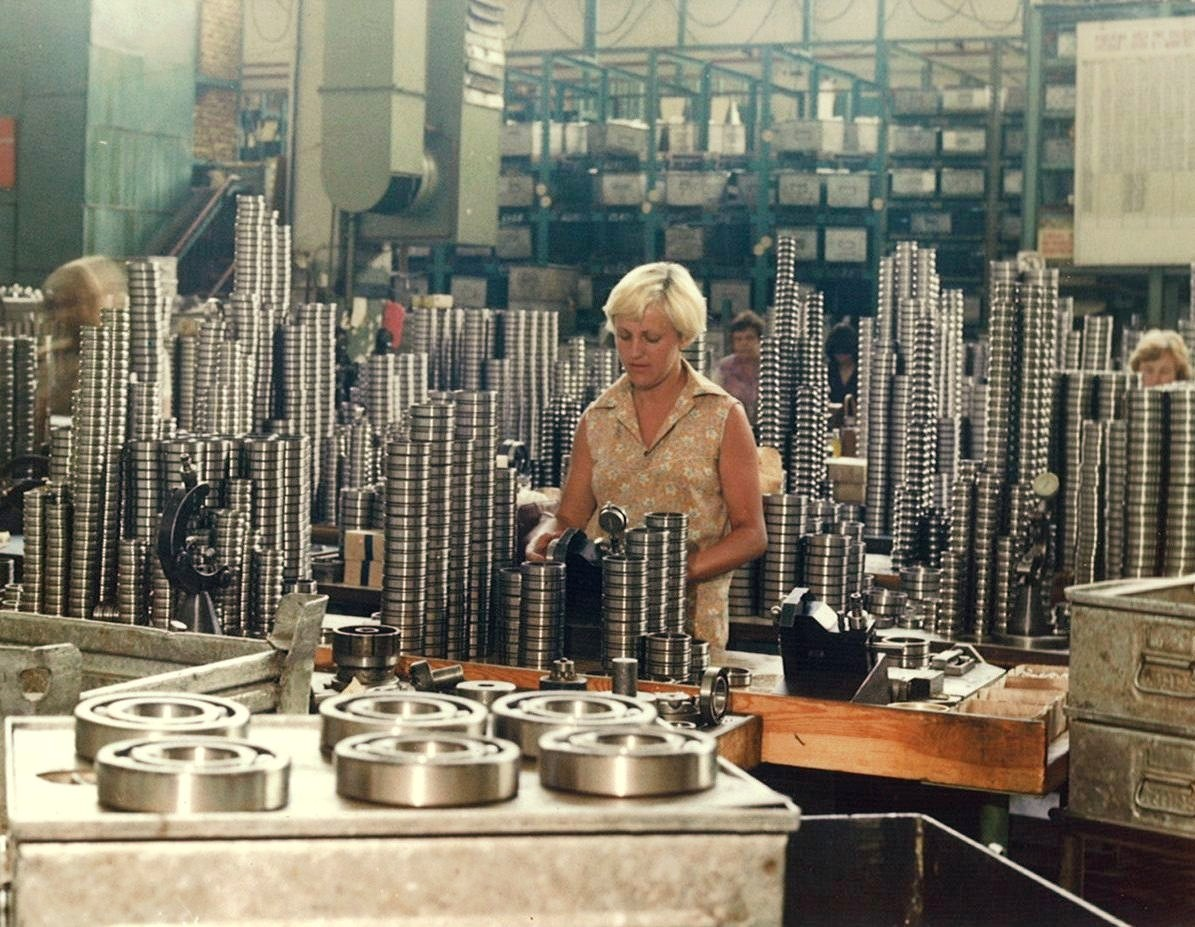 Pracovníčka na montáži